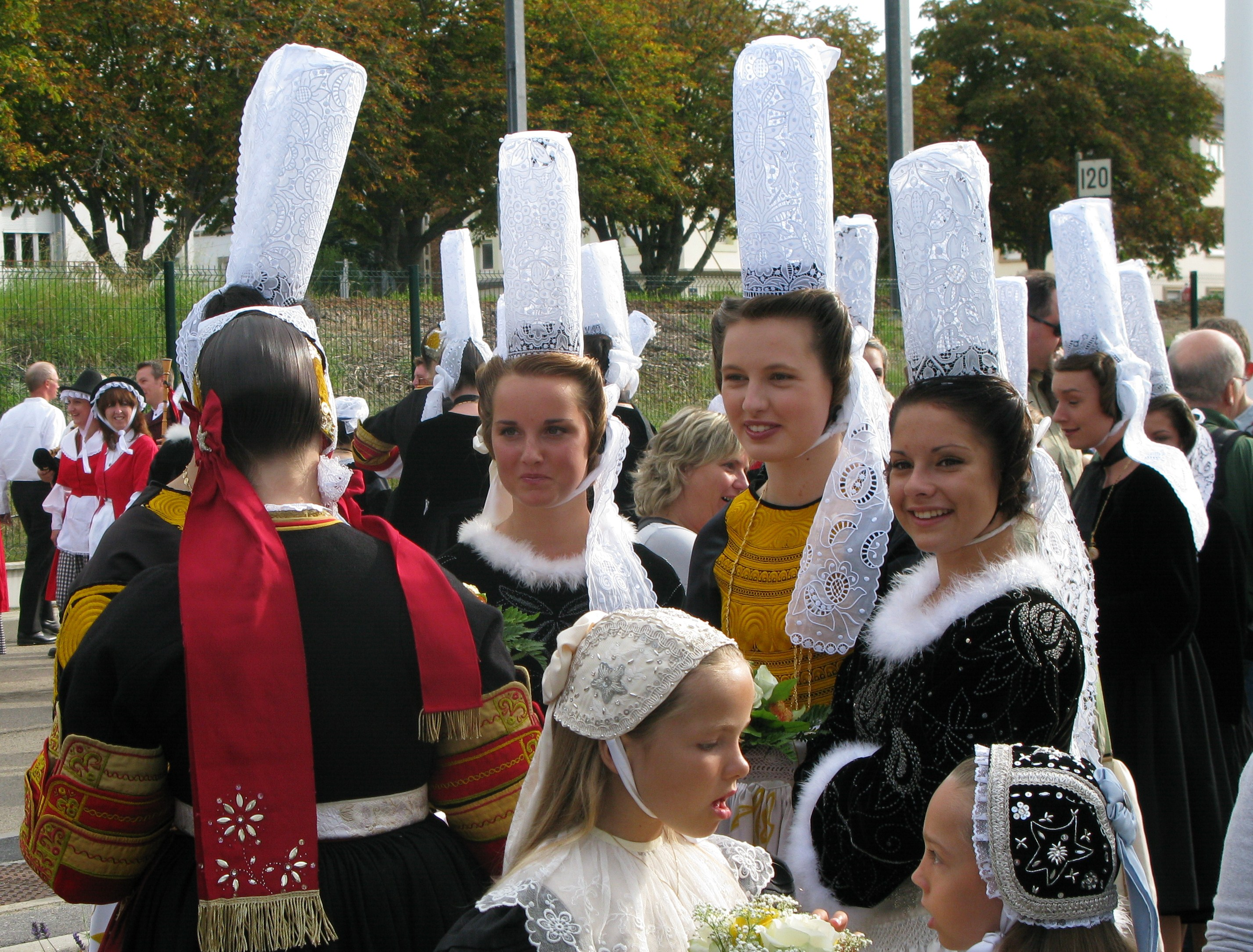 Coiffes bretonnes traditionnelles du cercle Ar Vro Vigoudenn portée pour la Grande Parade du Festical Interceltique de Lorient en 2009.